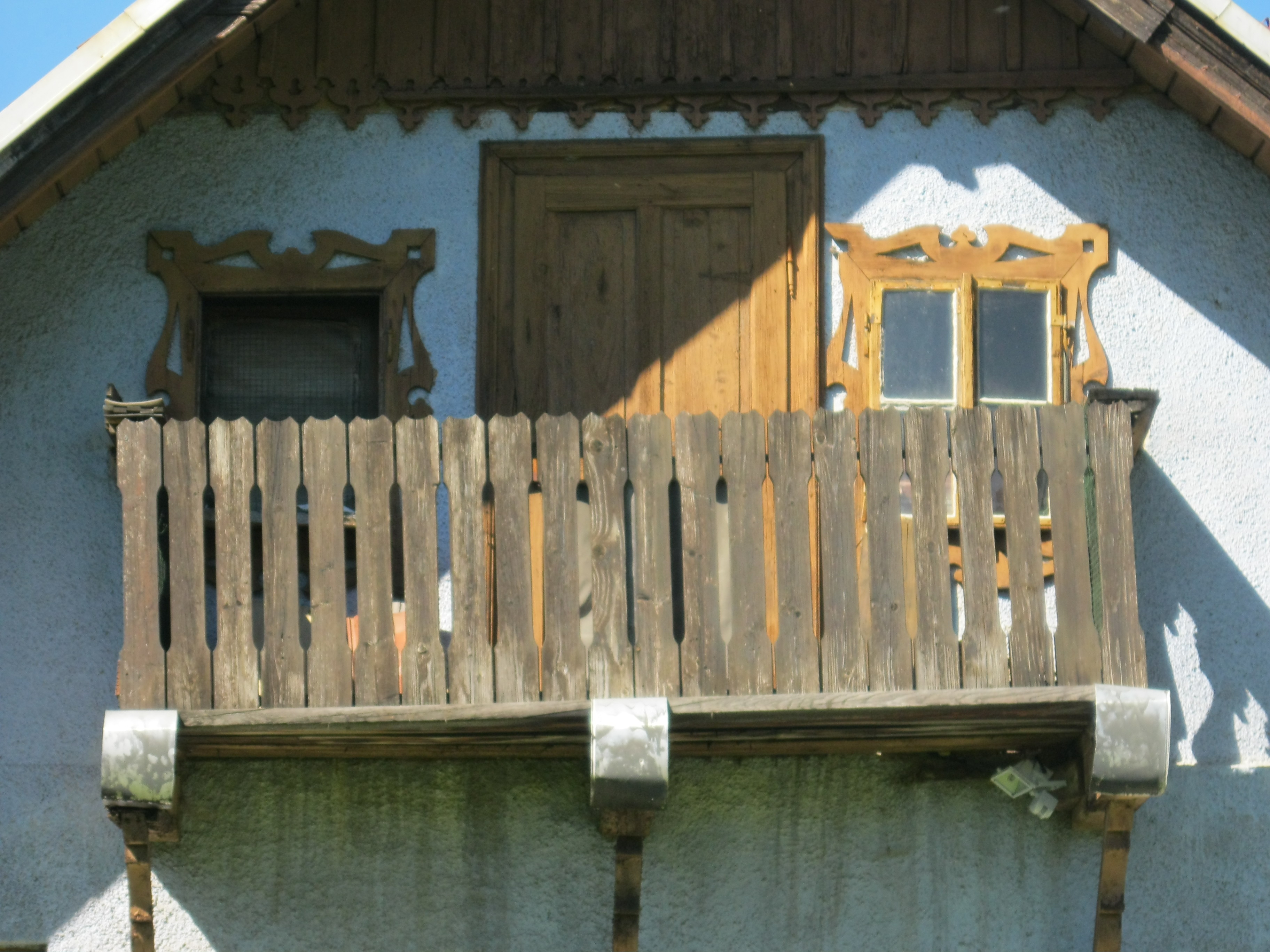 Keusche in Großlobming, Steiermark, Lobmingerstraße 2 Dieses Foto wurde im Rahmen des von Wikimedia Österreich unterstützten Projekts Wiki takes oberes Murtal erstellt. The making of this work was supported by Wikimedia Austria. For other files made with the support of Wikimedia Austria, please see the category Supported by Wikimedia Österreich. Object location47° 10′ 58.44″ N, 14° 48′ 29.3″ E